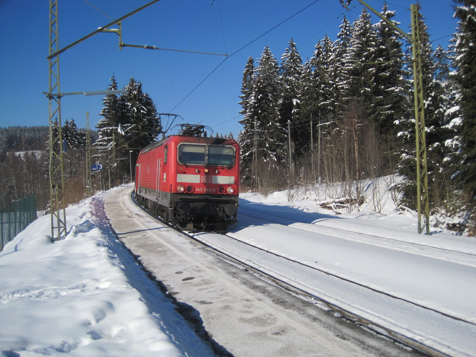 Zug der Dreiseenbahn im verschneiten Bahnhof Aha